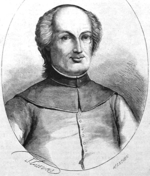 Diego Antonio Cernadas de Castro (1702-1777)